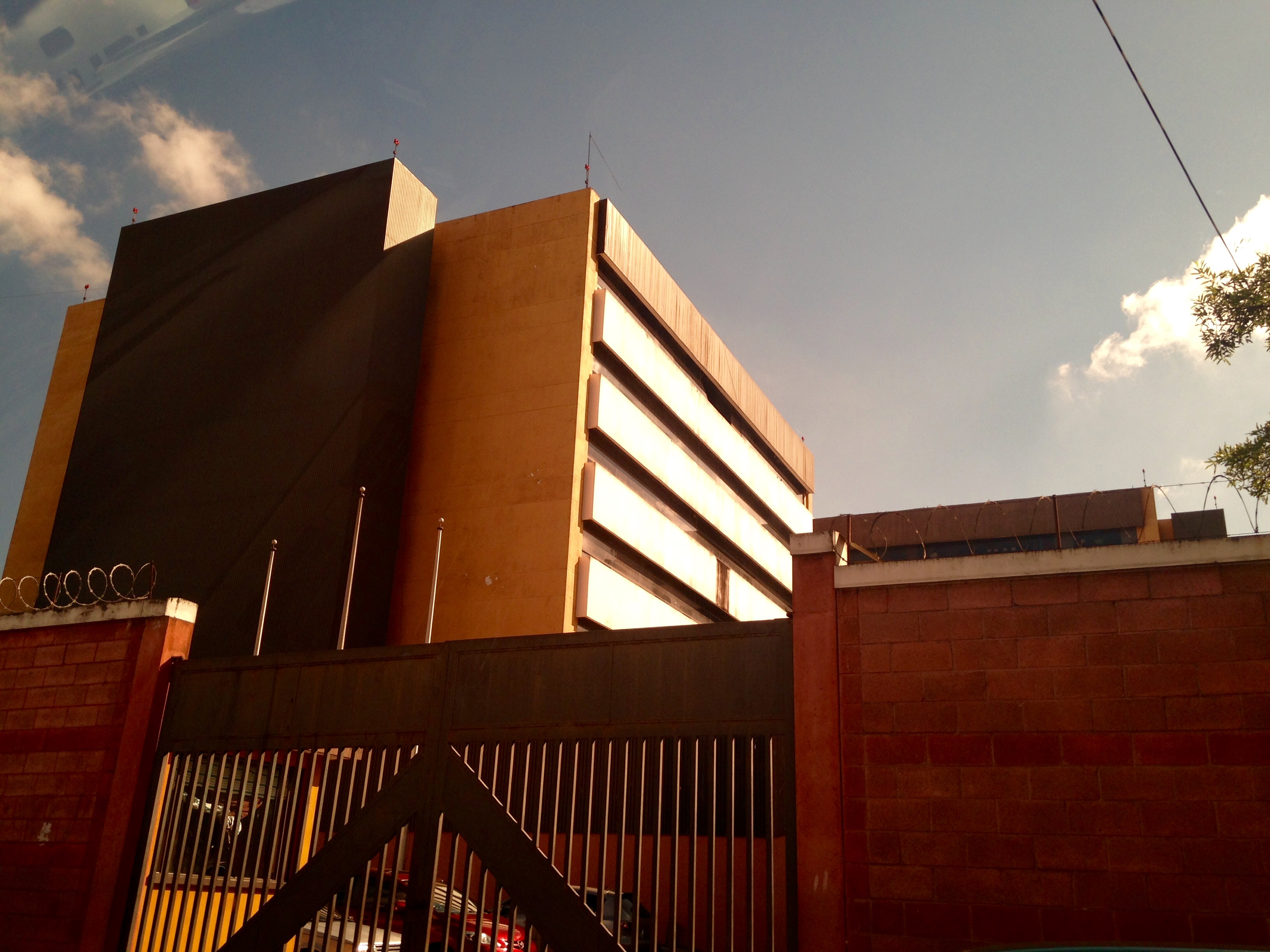 Instalaciones del Hospital General San Juan de Dios en la Ciudad de Guatemala. Edificio construido en 1981 por el gobierno del general Fernando Romeo Lucas Garcia.